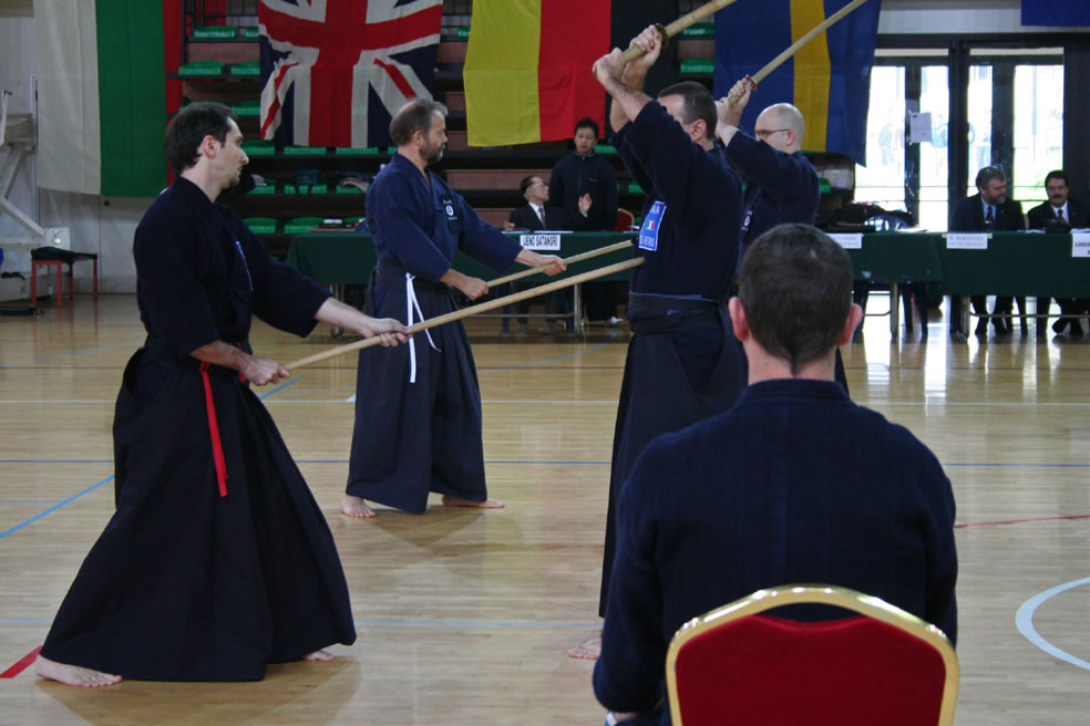 Picture of jodo shiai, EC-2005 Bologna, Italy vs Finland, shodan level/ Kuva Bolognan jodo EM-kisoista 2005. Kuvassa Shodan luokassa Italia vs Suomi